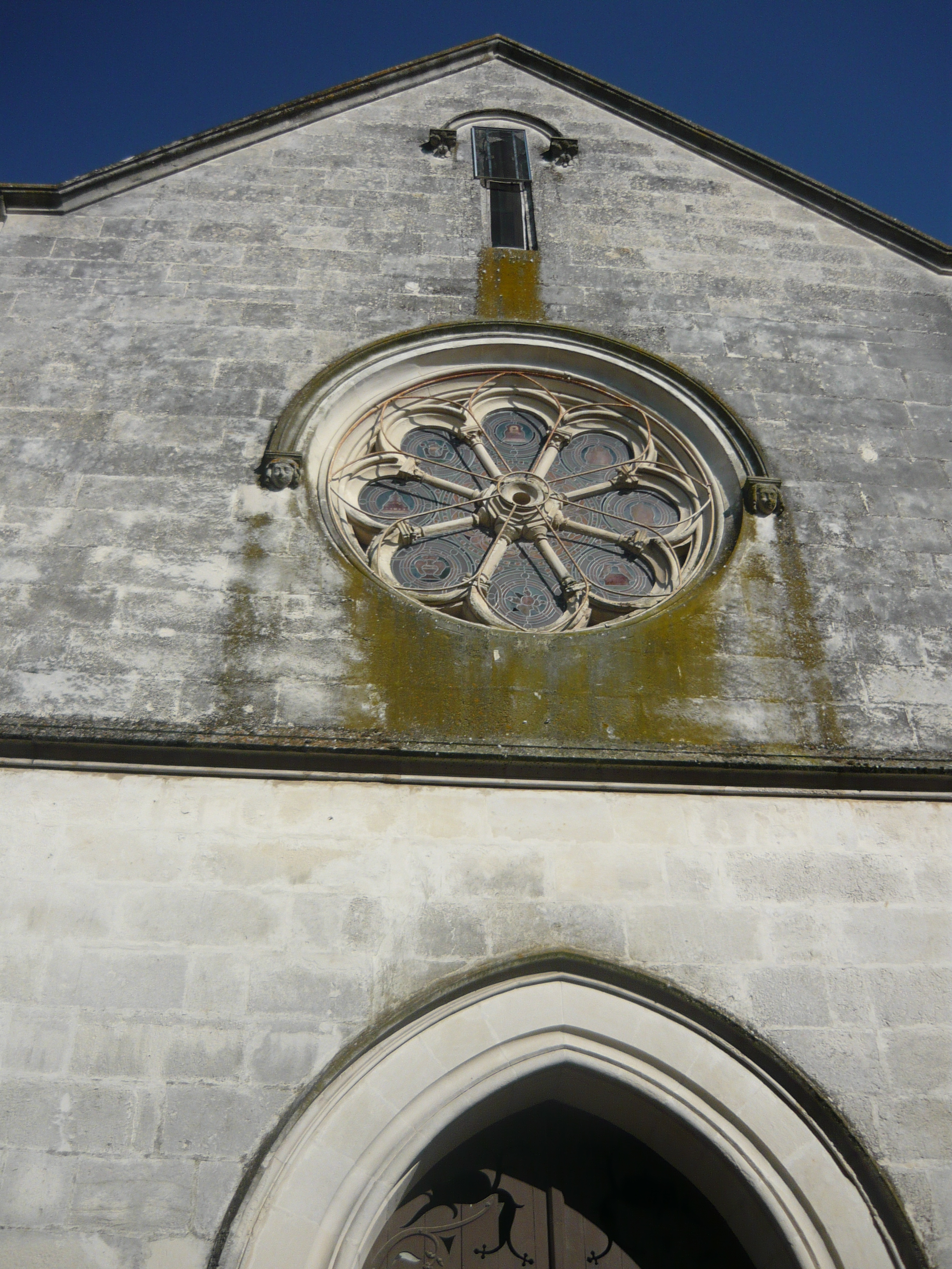 Façade de la Chapelle des Ursulines sur la rue Roosevelt à Pons (17).